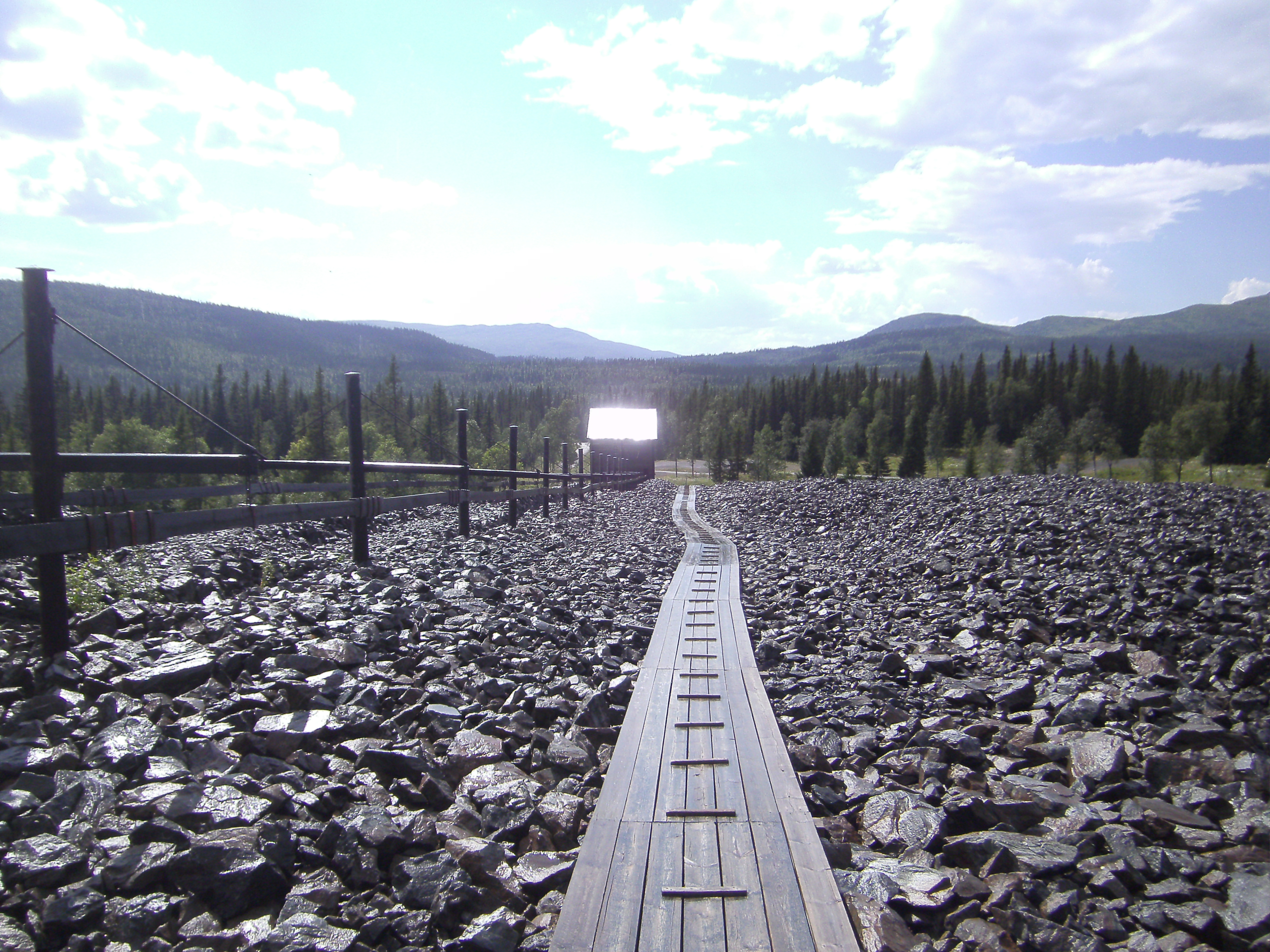 Stånggången från vattenhjulet till pumpen vid Fröå Gruva